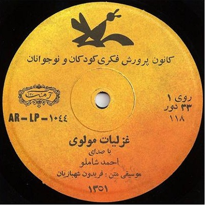 مجموعه‌ی غزلیات مولوی، دکلمه‌ی احمد شاملو و موسیقی فریدون شهبازیان که در سال 1351 بر روی صفحات 33 دور منتشر شد